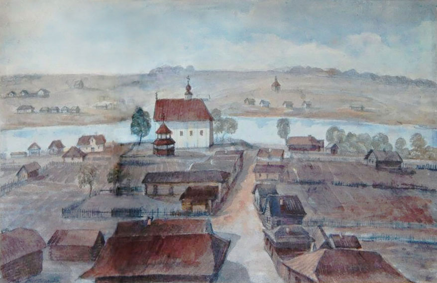 Беларуская (тарашкевіца): Друя (Druja), вуліца Новая (vulica Novaja). Царква Зьвеставаньня Прасьвятой Багародзіцы